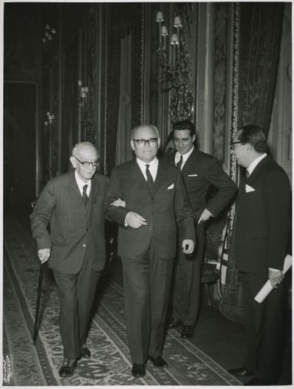 Auguri al Presidente della Repubblica Giuseppe Saragat, Giuseppe Paratore accompagnato da Giulio Pastore